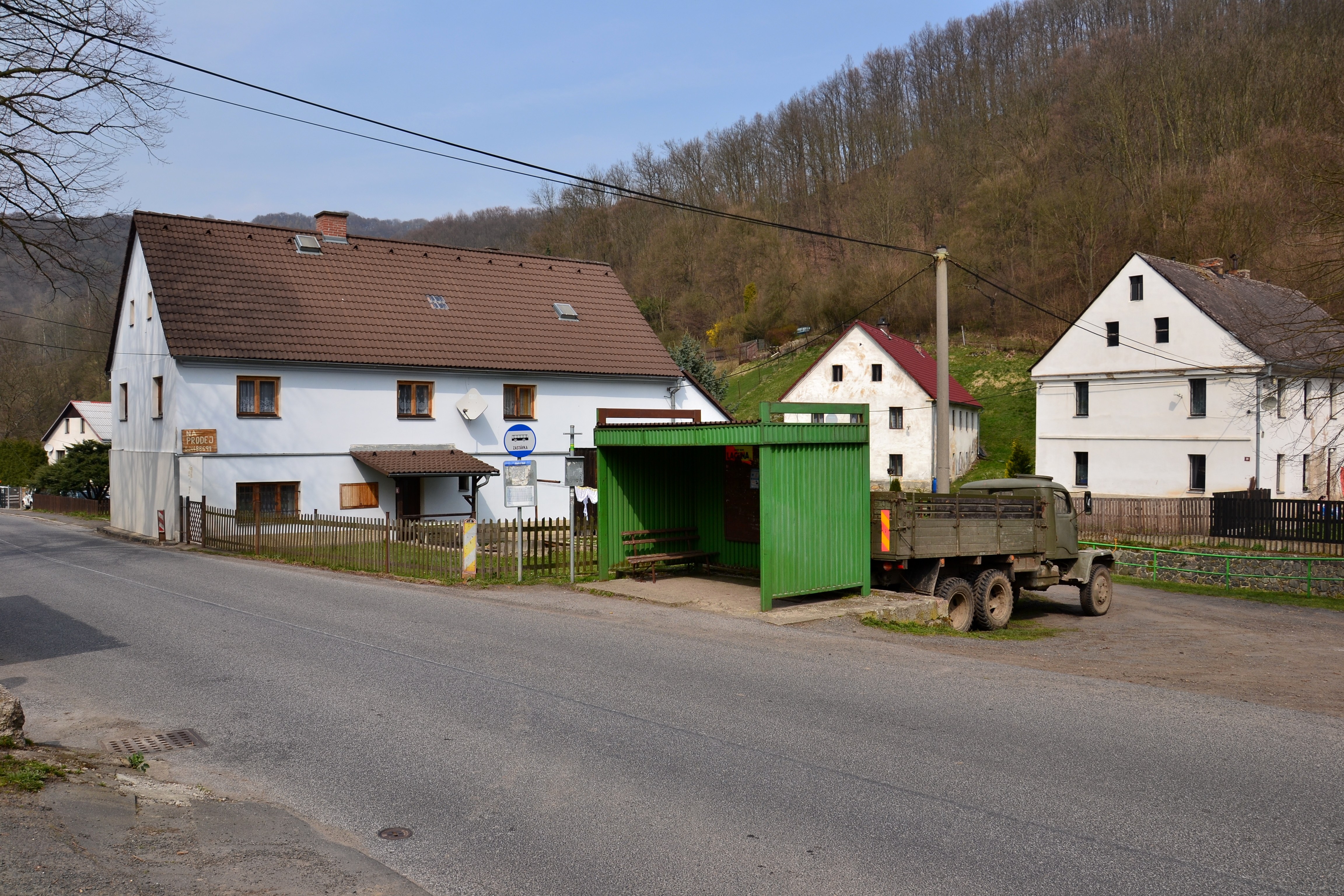 Náves